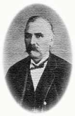 Francisco Righetti - 1900